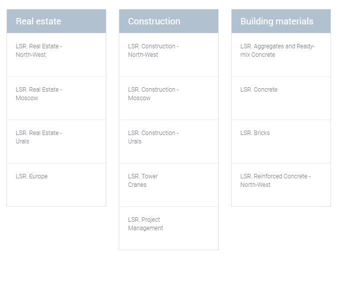 Структура "Группы ЛСР" на 2018 год